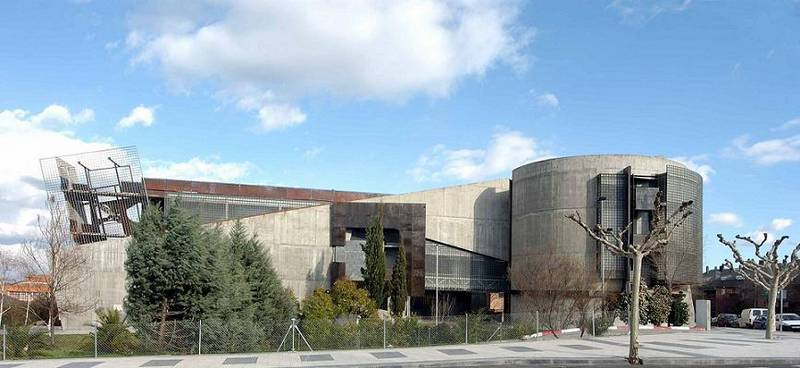 Auditorio Municipal Alfredo Kraus, en Majadahonda (Comunidad de Madrid, España.).